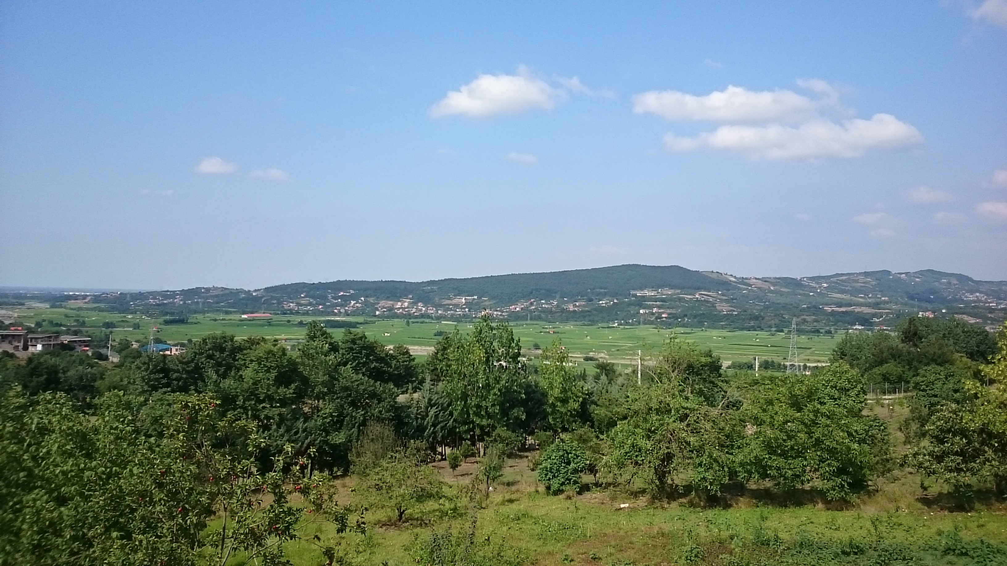 شالیزارهای پیرامون رود تجن در محل ورود به شهر ساری